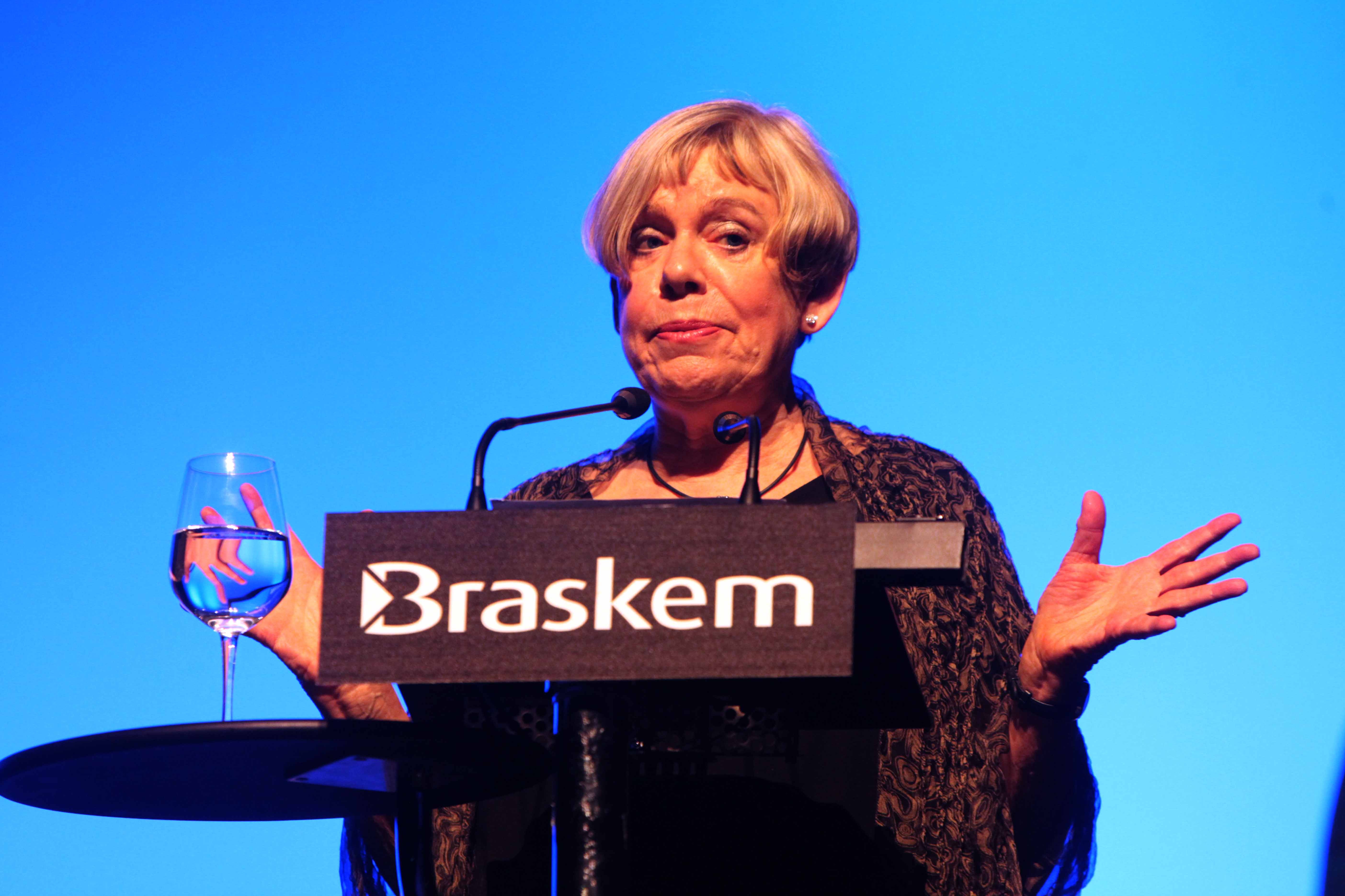 Karen Armstrong no Fronteiras do Pensamento São Paulo